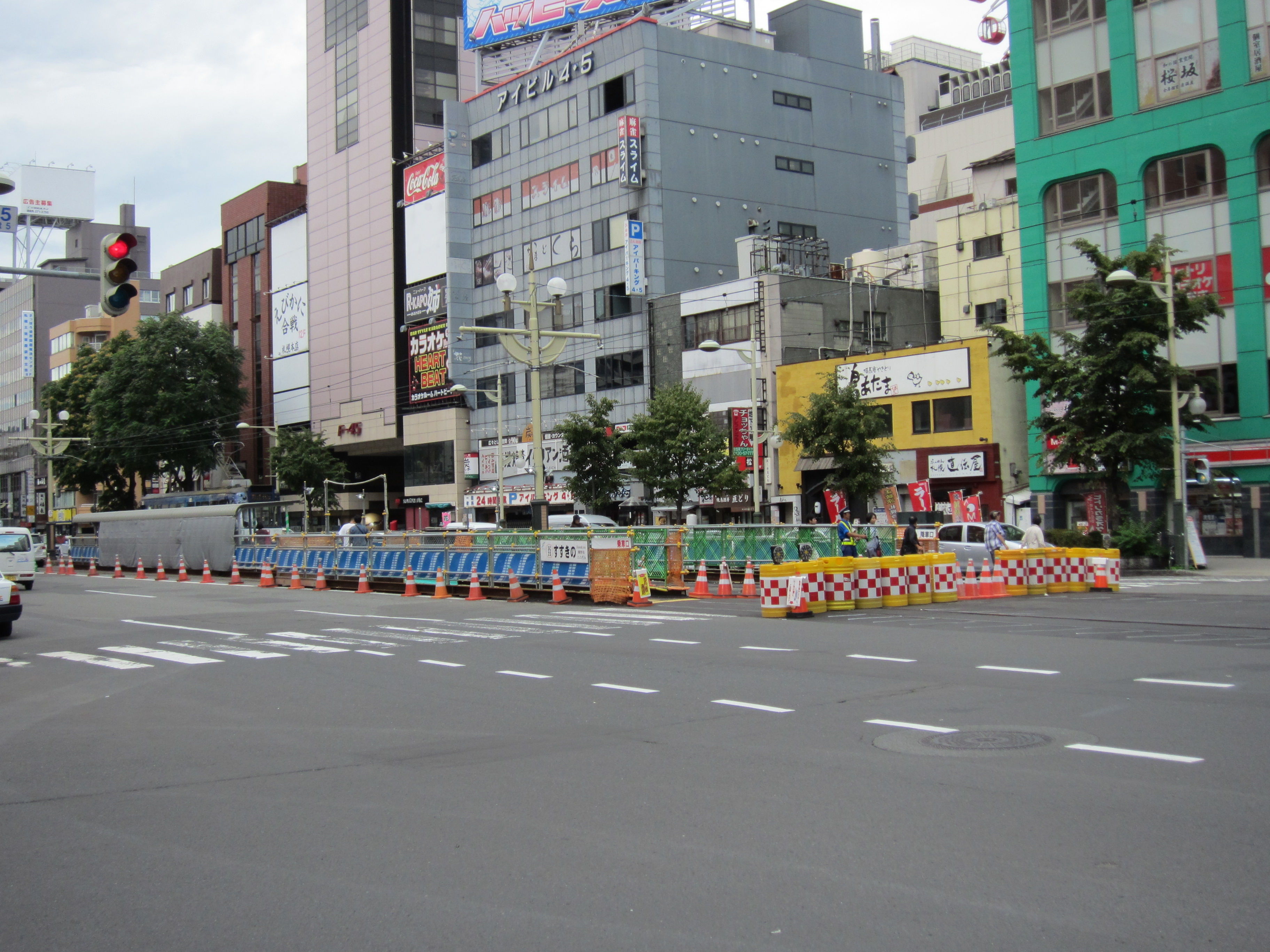 札幌市電のすすきの停留場付近 2015年の札幌市電ループ化工事中の様子